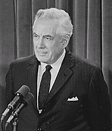 Warren Burger nach seiner Ernennung zum obersten Bundesrichter der USA 21. Mai 1969. Teil eines Fotos von Warren E. Burger und Richard Nixon. Die Originalbeschriftung lautet: President Nixon looks on as the newly appointed chief justice of the Supreme Court, Warren Burger, says a few remarks.